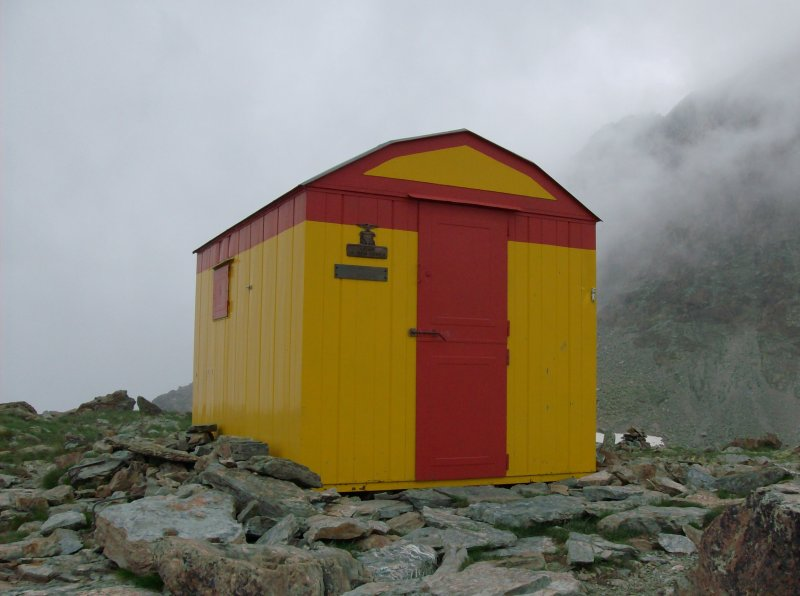 Il Bivacco Bertoglio (Monviso, Vallone delle Giargiatte) nella nebbia